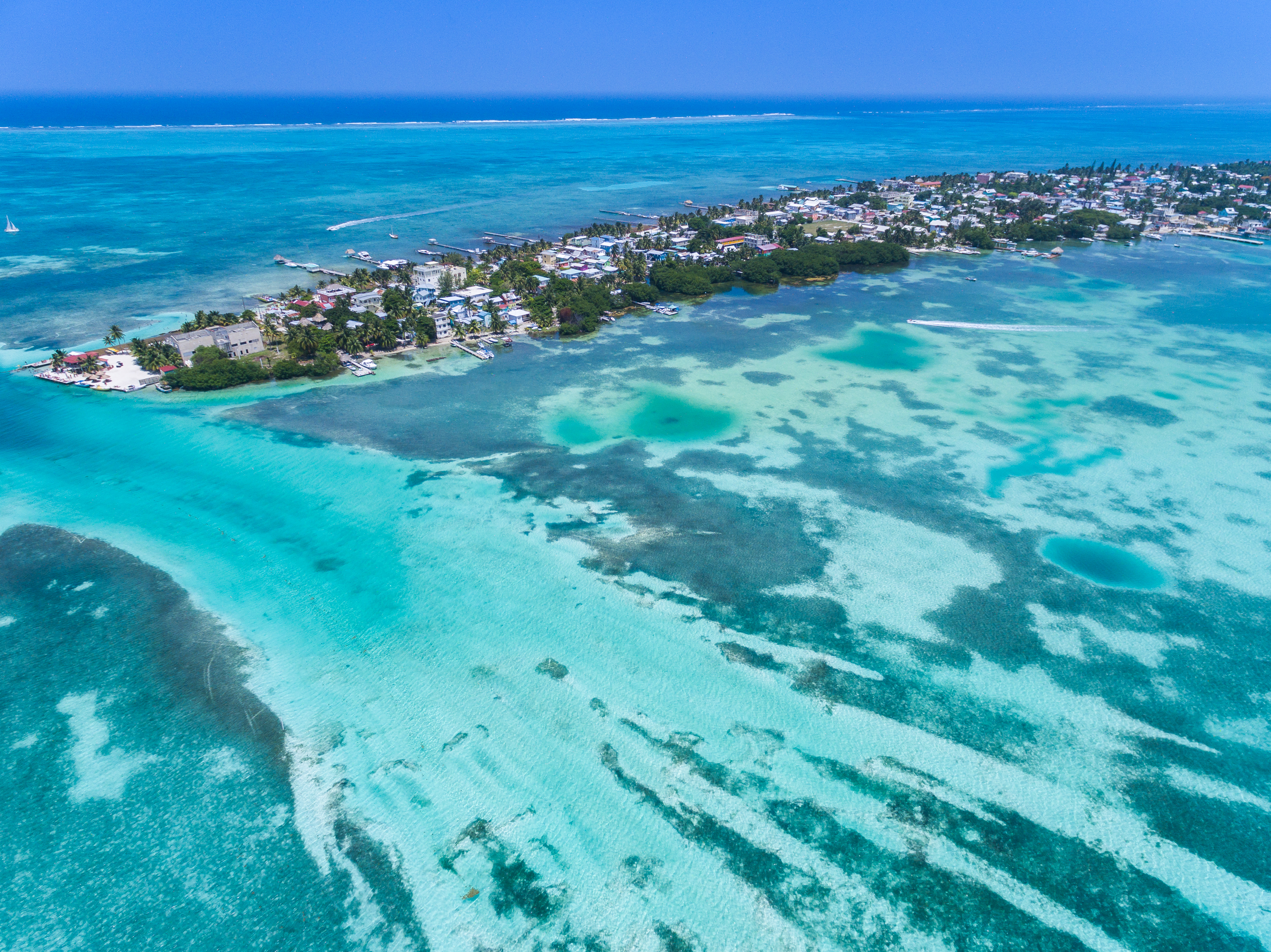 beautiful island in Belize, Caye Caulker